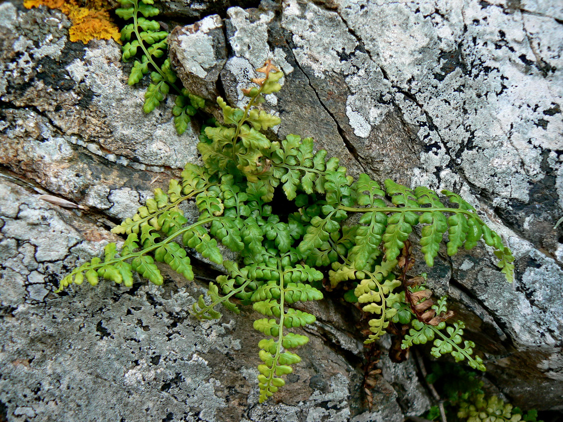 Asplenium obovatum subsp. obovatum, Cap Taillat, France.